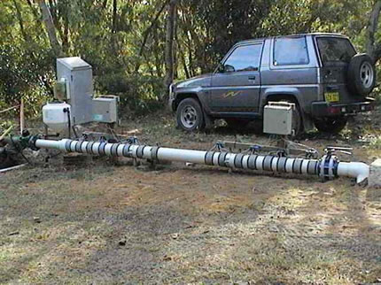 Descalcificador de para tuberías de 20cm de diametro.